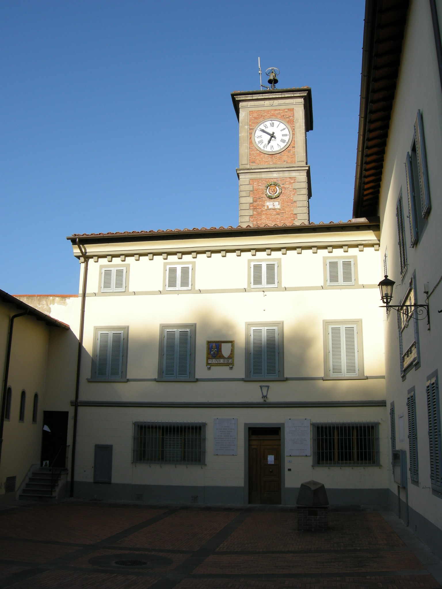 Comune di san piero a sieve